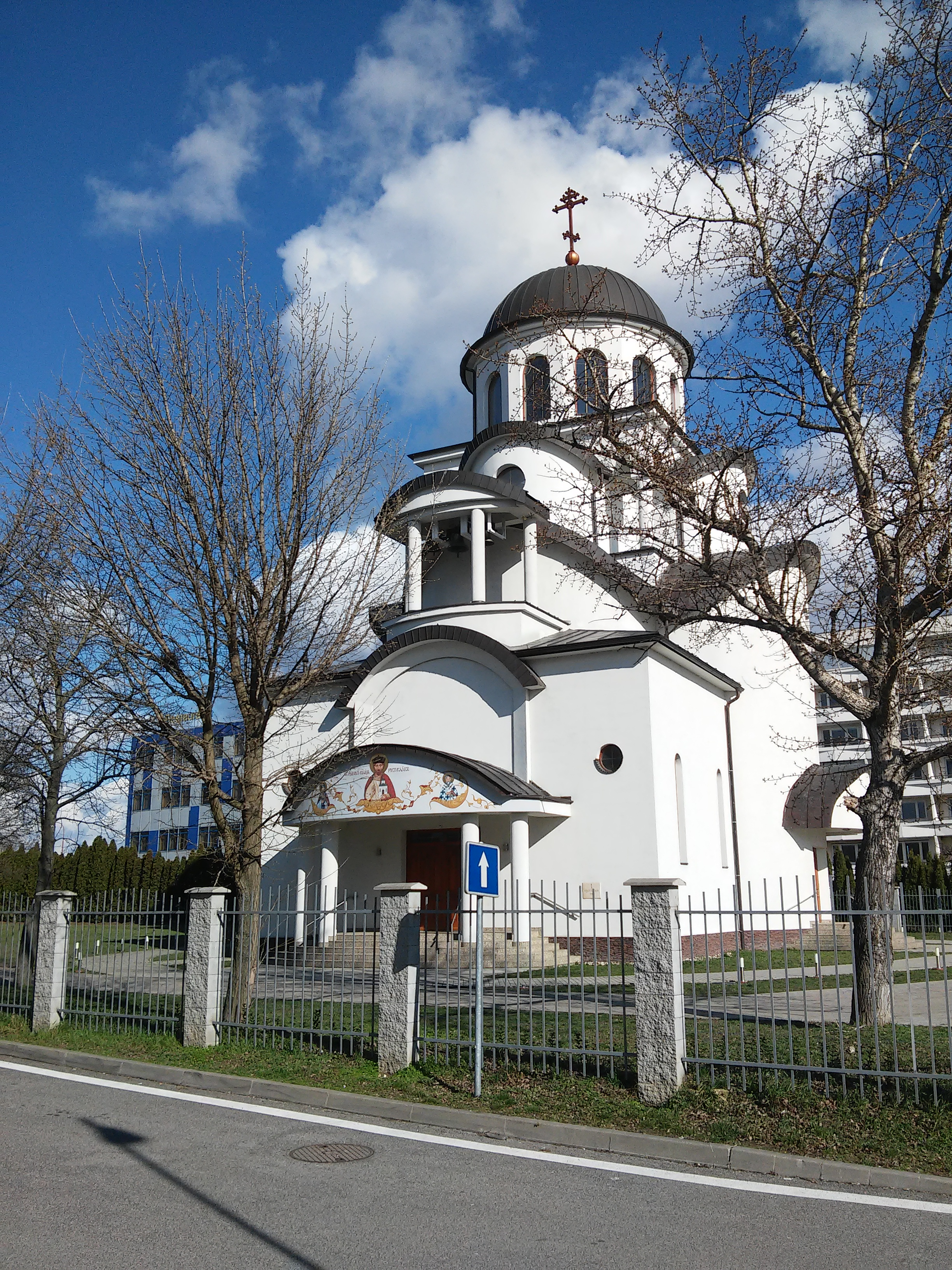 Chrám svätého Rastislava v Bratislave